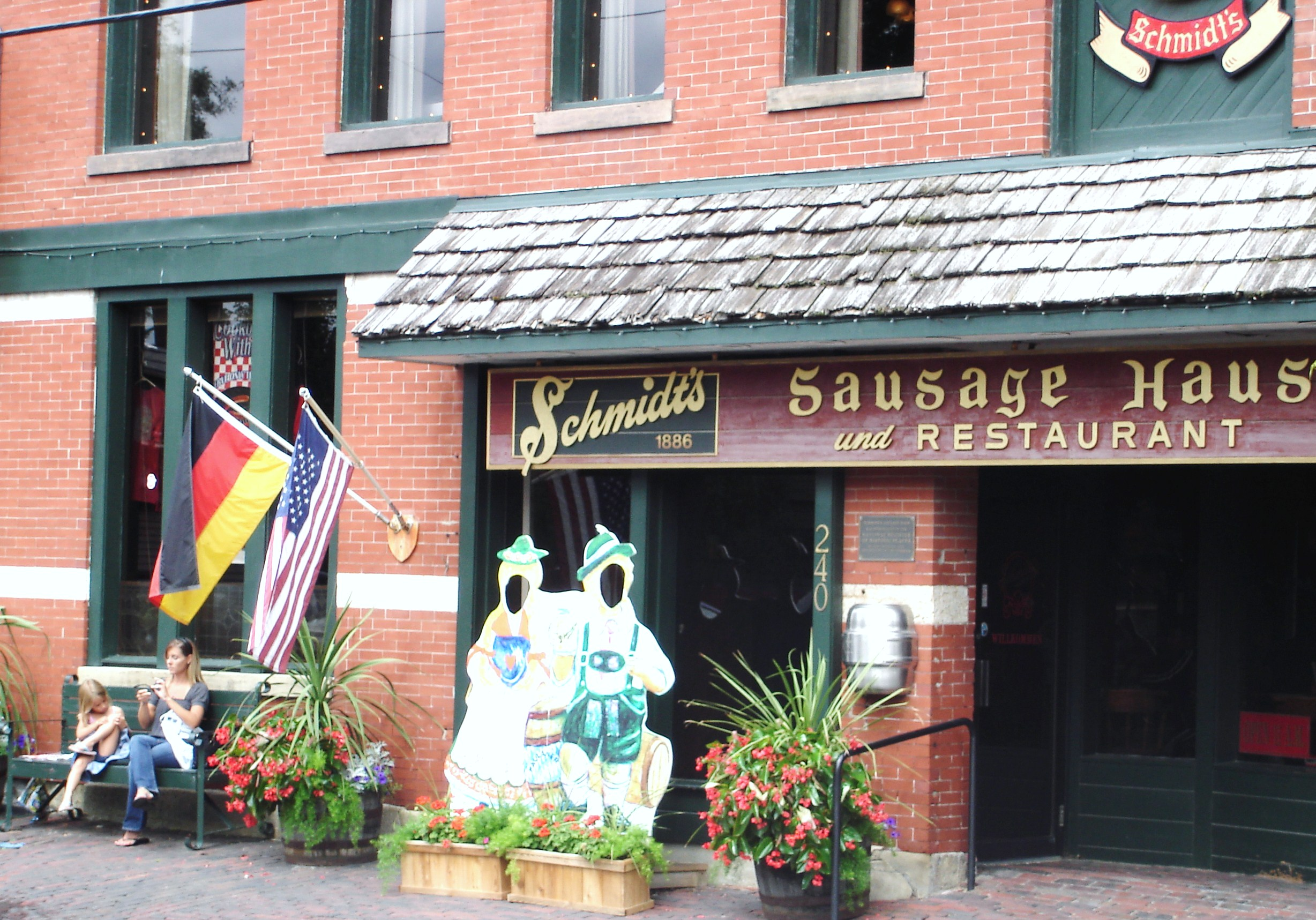 Schmidt's Sausage Haus